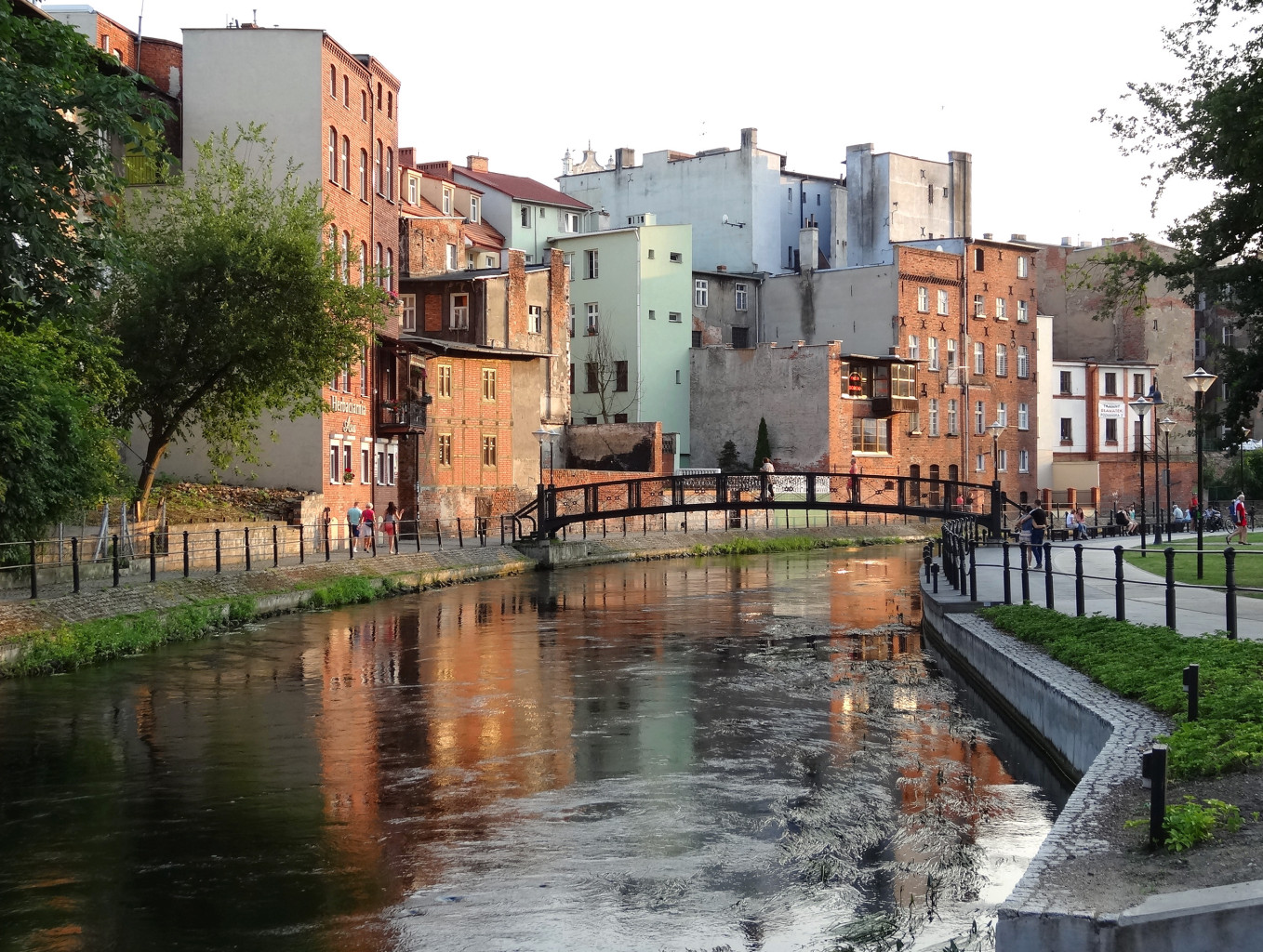 Wenecja Bydgoska – zespół architektoniczny Starego Miasta w Bydgoszczy zbudowany bezpośrednio nad rzeką Młynówką (1870-1900).